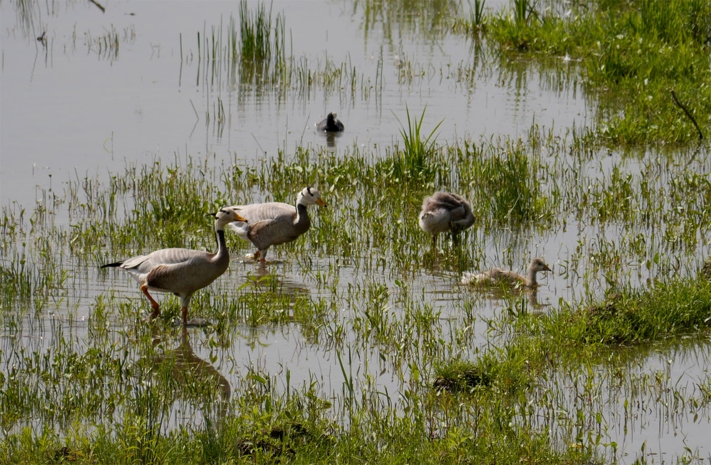 Deitsch: Paar Streifengänse (Anser Indicus) mit 2 Küken, 19. Juni 2013, Petite Camargue Alsacienne